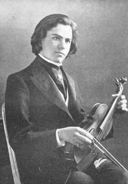 Jan Kubelik, tschechischer Violonist und Komponist